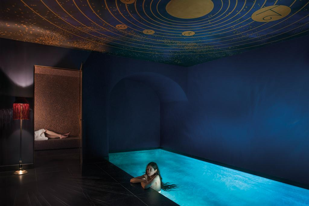 Salon eau maison souquet